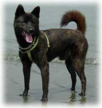 Kai Dog